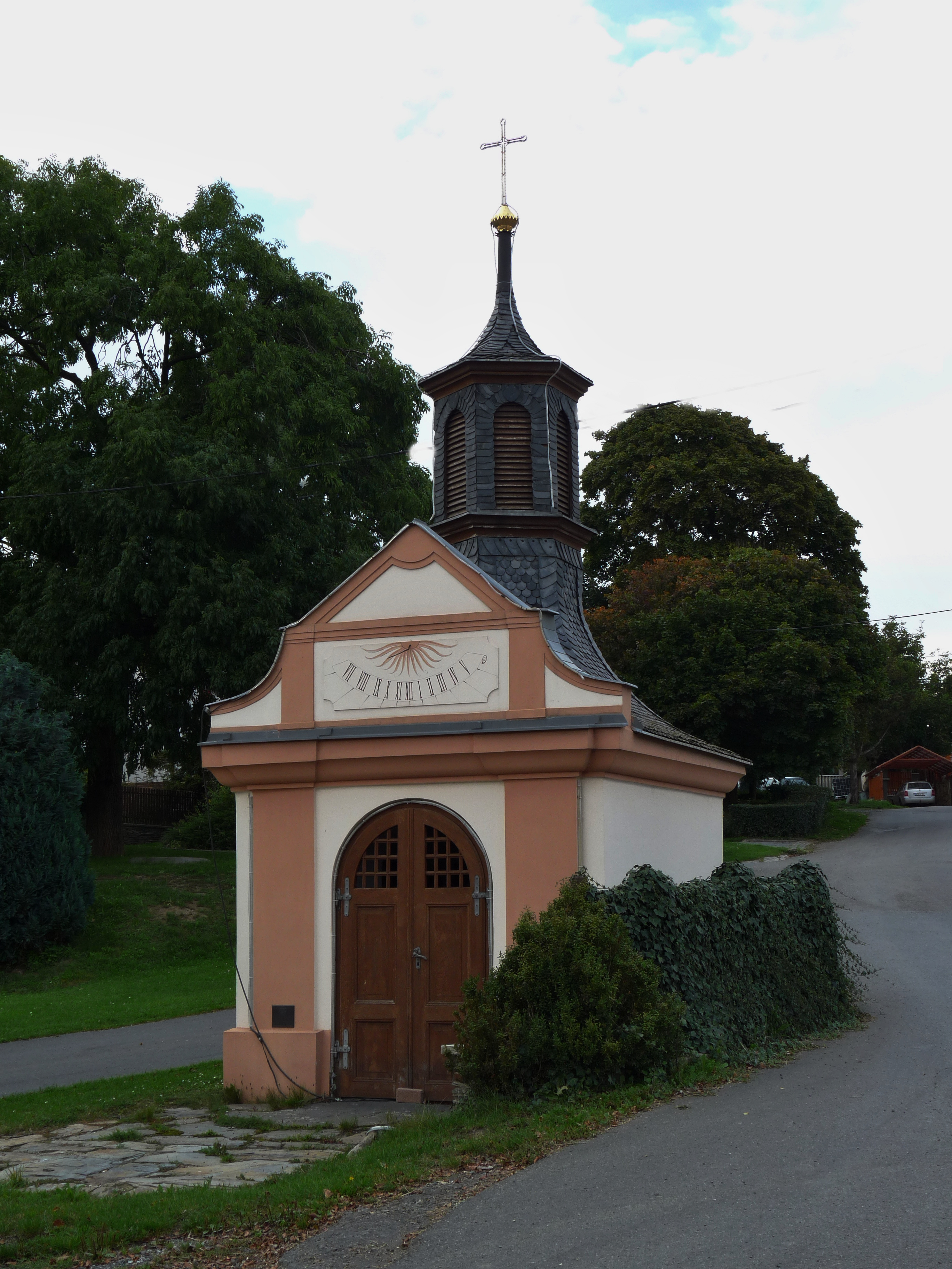 Kaplička, náves, Štichovice.